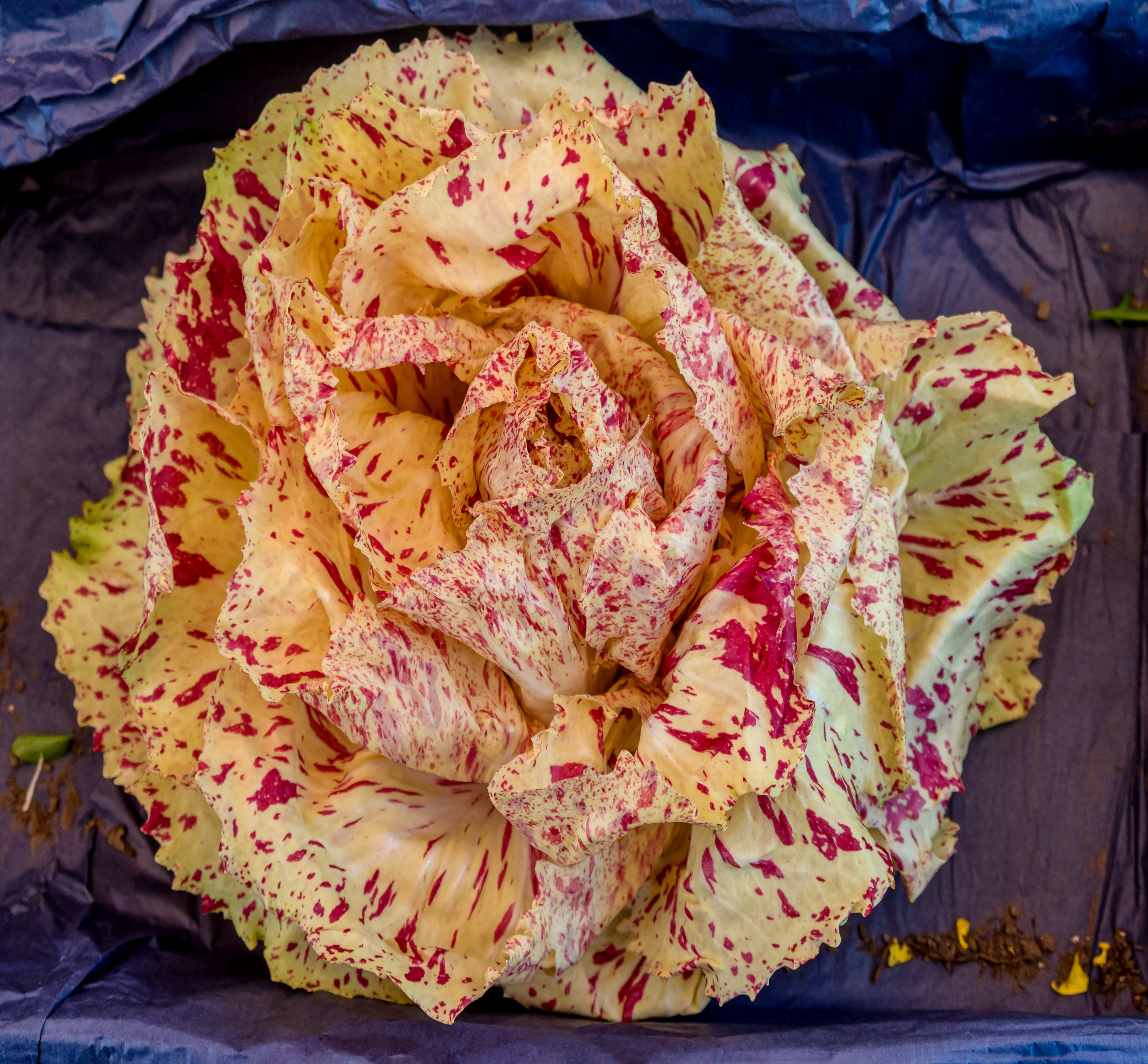 Bilder aus Freiburg Aufnahmen vom 24.03 2018